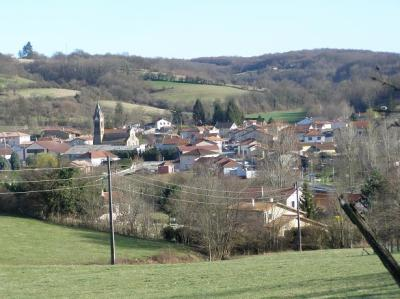 Village de Cour et Buis depuis les collines alentours.